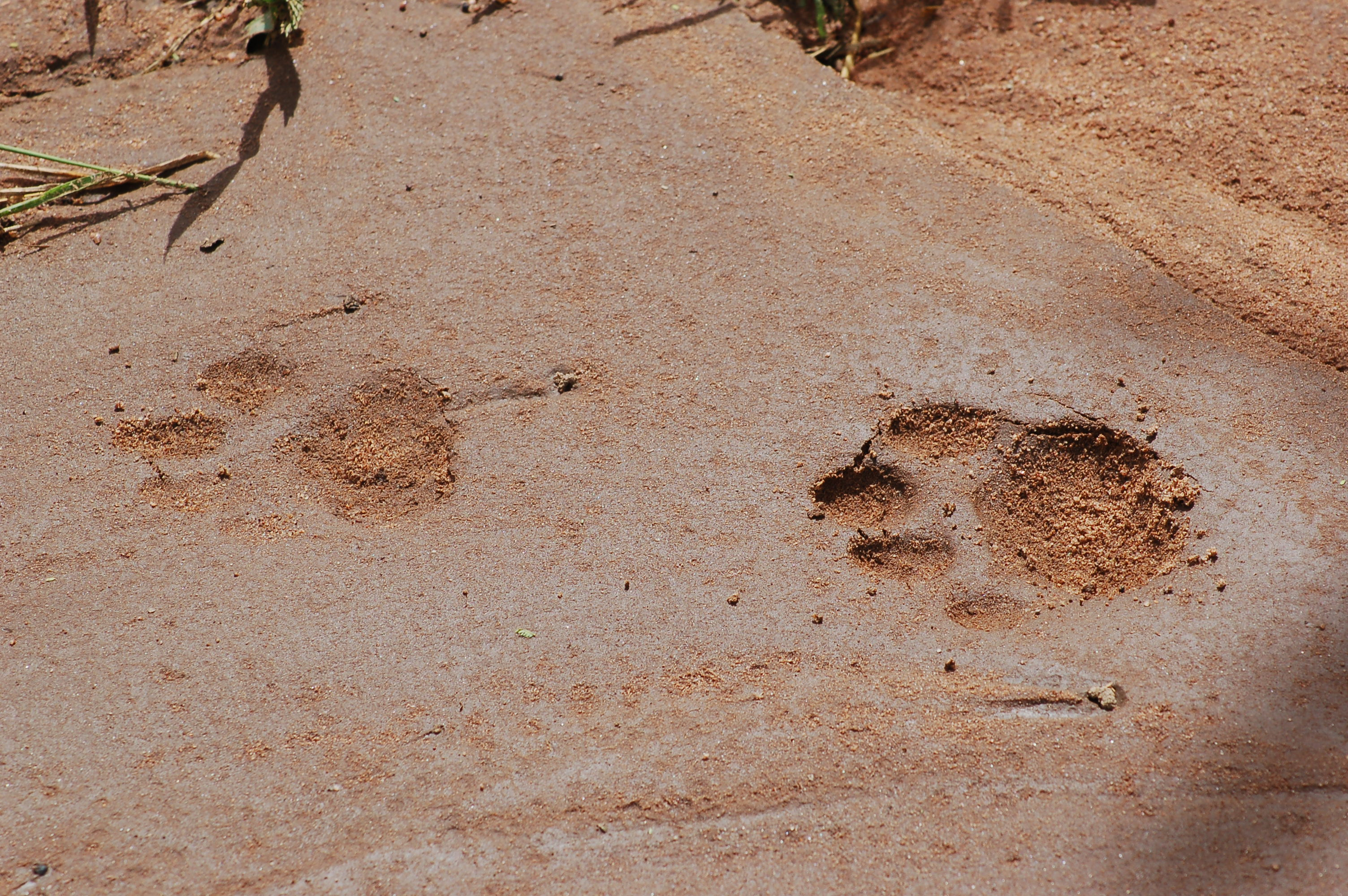 Serengeti, Tanzania